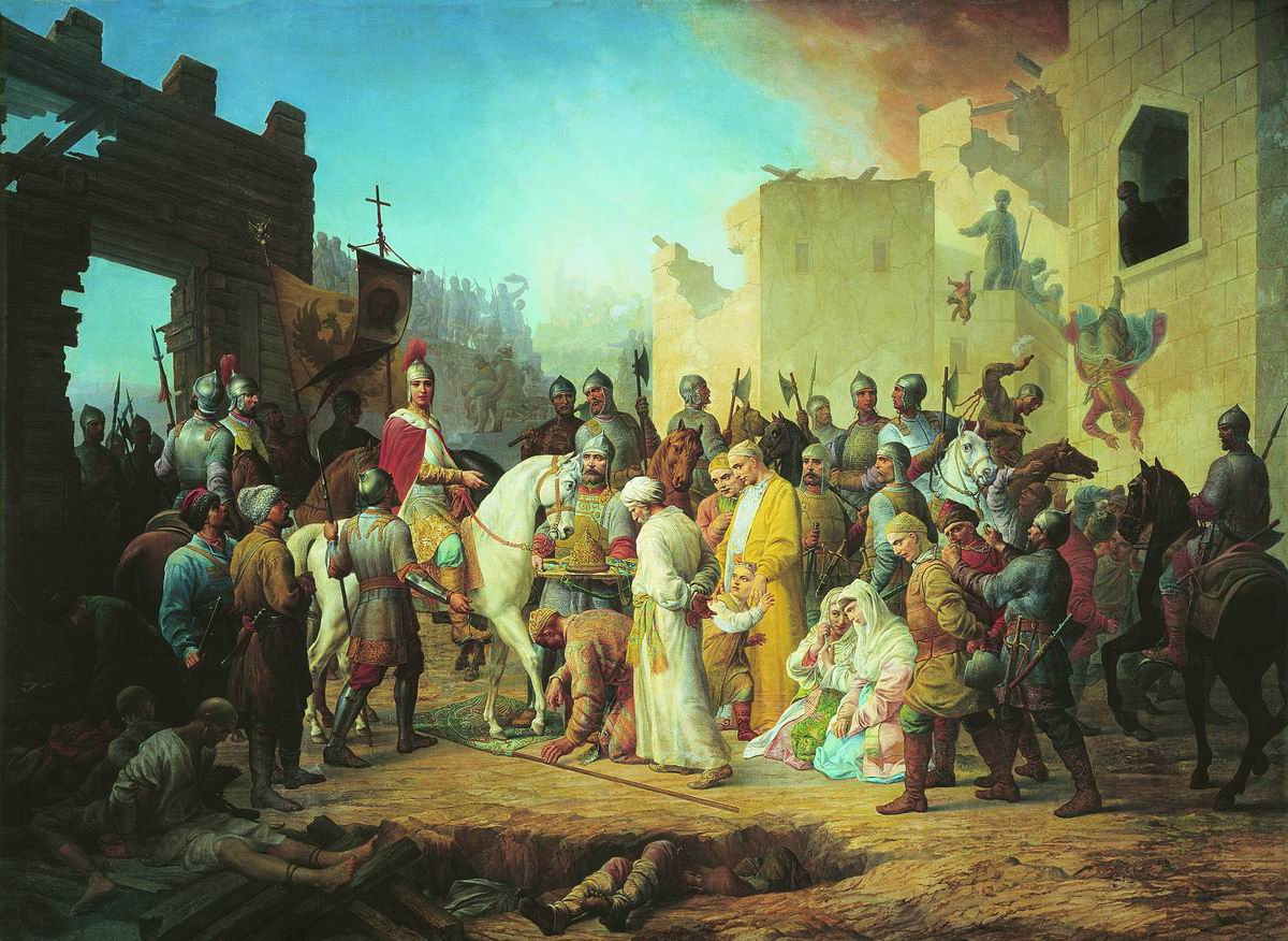 Вступление Иоанна IV в Казань. 1894. Холст, масло. 189 x 260.5 см Николаевский художественный музей им. В. В. Верещагина